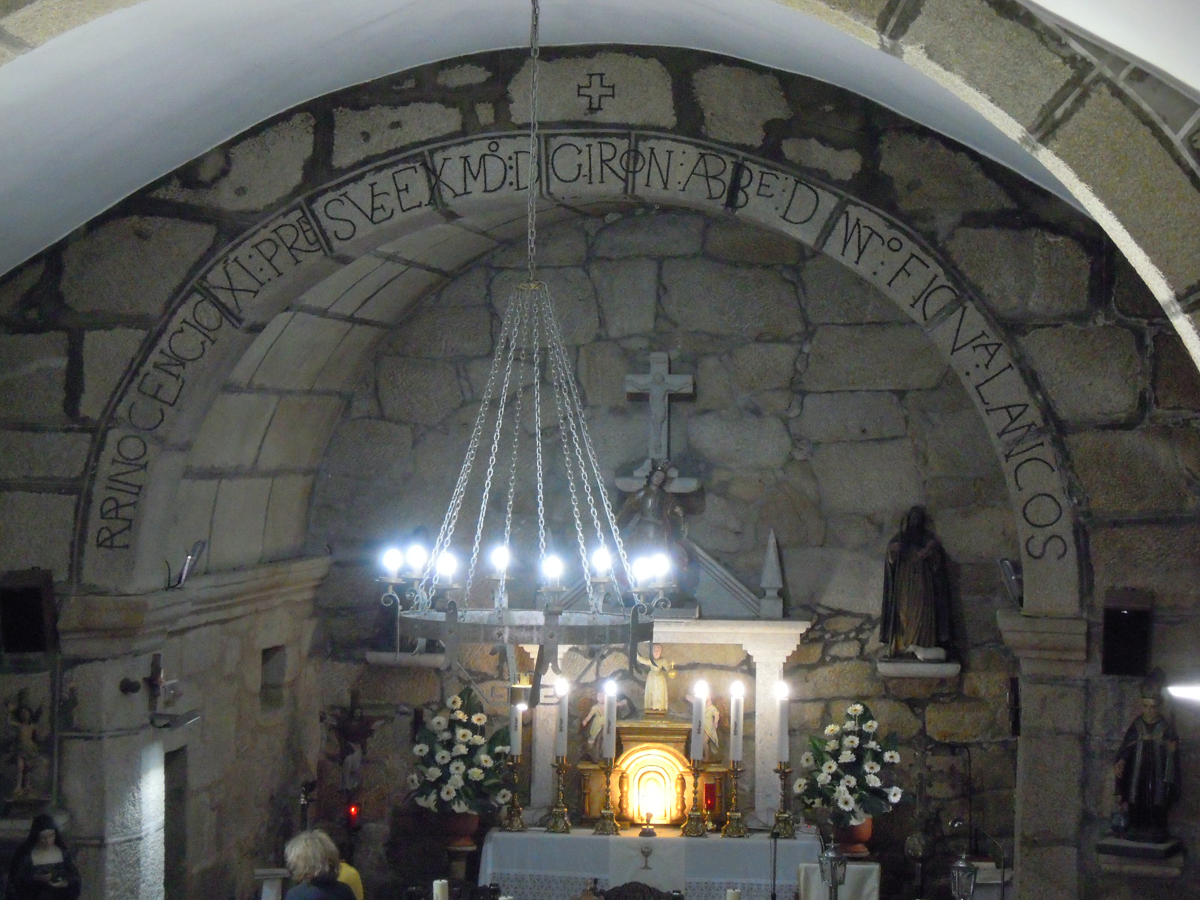 Interior da igrexa parroquial de Santa Cristina de Cobres (Vilaboa).